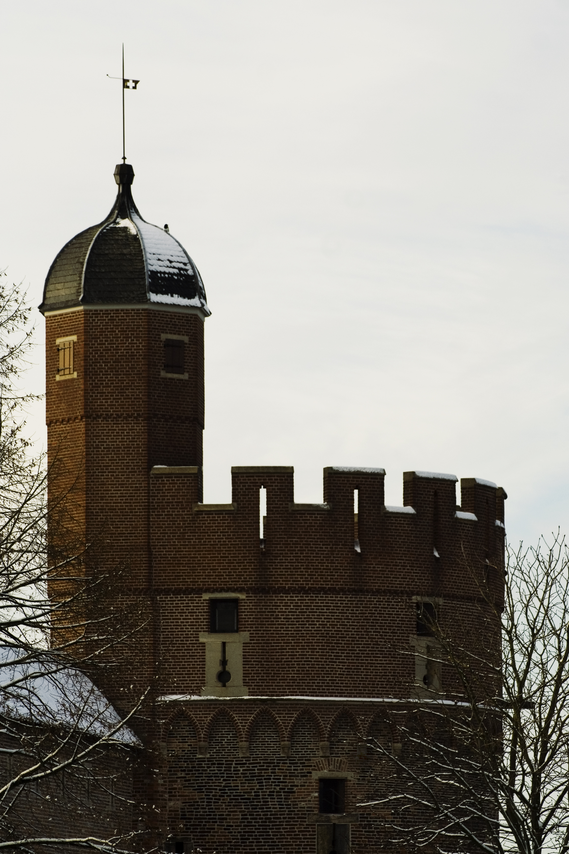 Adres - bij Aan de Stadsmuur 83 Plaats - Zwolle Type object - Gebouw Oorspr functie - Fort, vesting en -onderdl Bouwjaar - 1475-1500